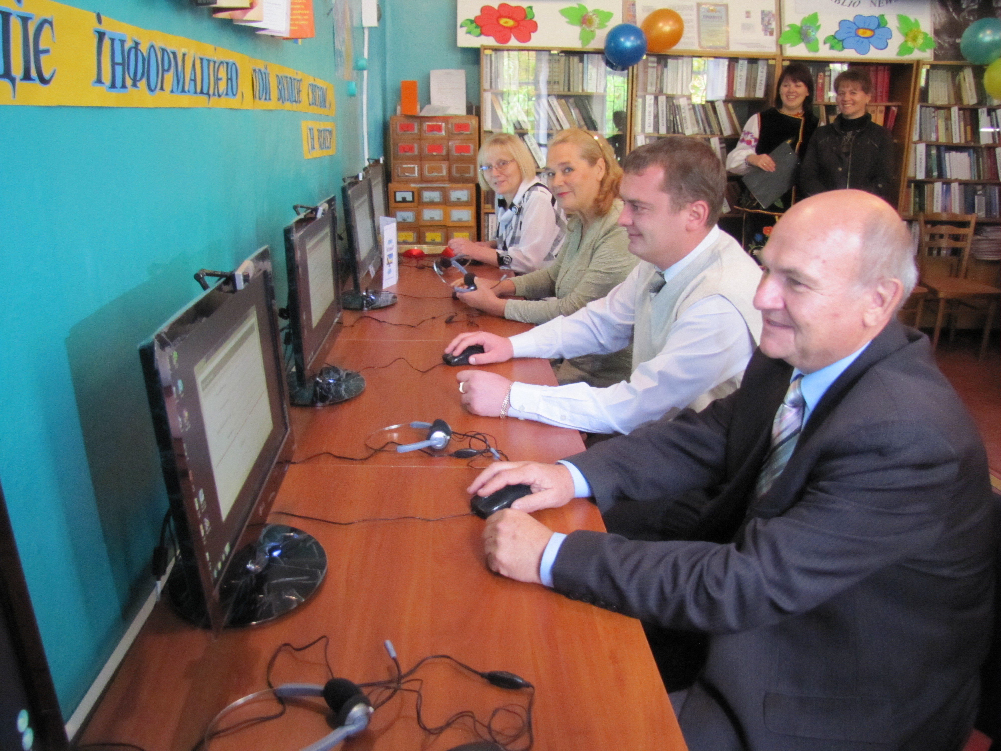 Відкриття "Інтернет-центру" в Великомихайлівській ЦРБ, на фото відкривачі та перші відвідувачі